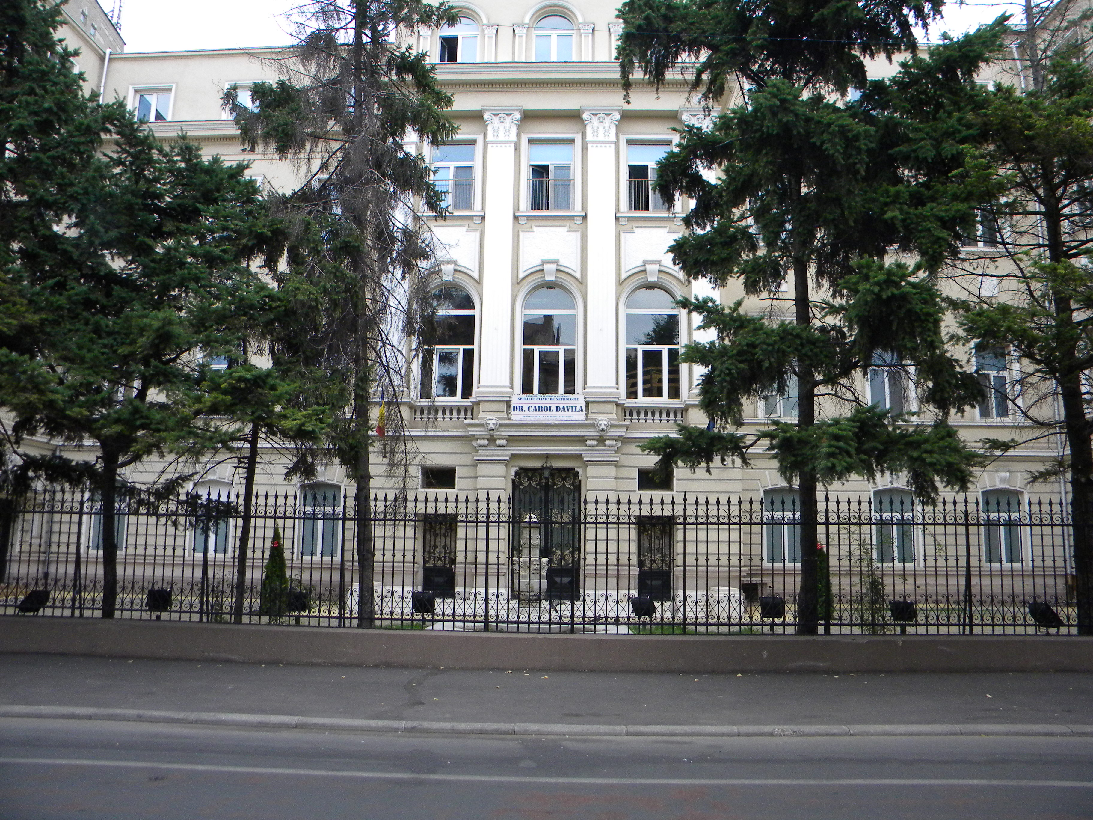 Bucuresti, Romania, Fostul Sediu al Curtii de Conturi azi Spitalul Dr. Carol Davila, Calea Grivitei nr. 4, sect. 1 (detaliu 1)